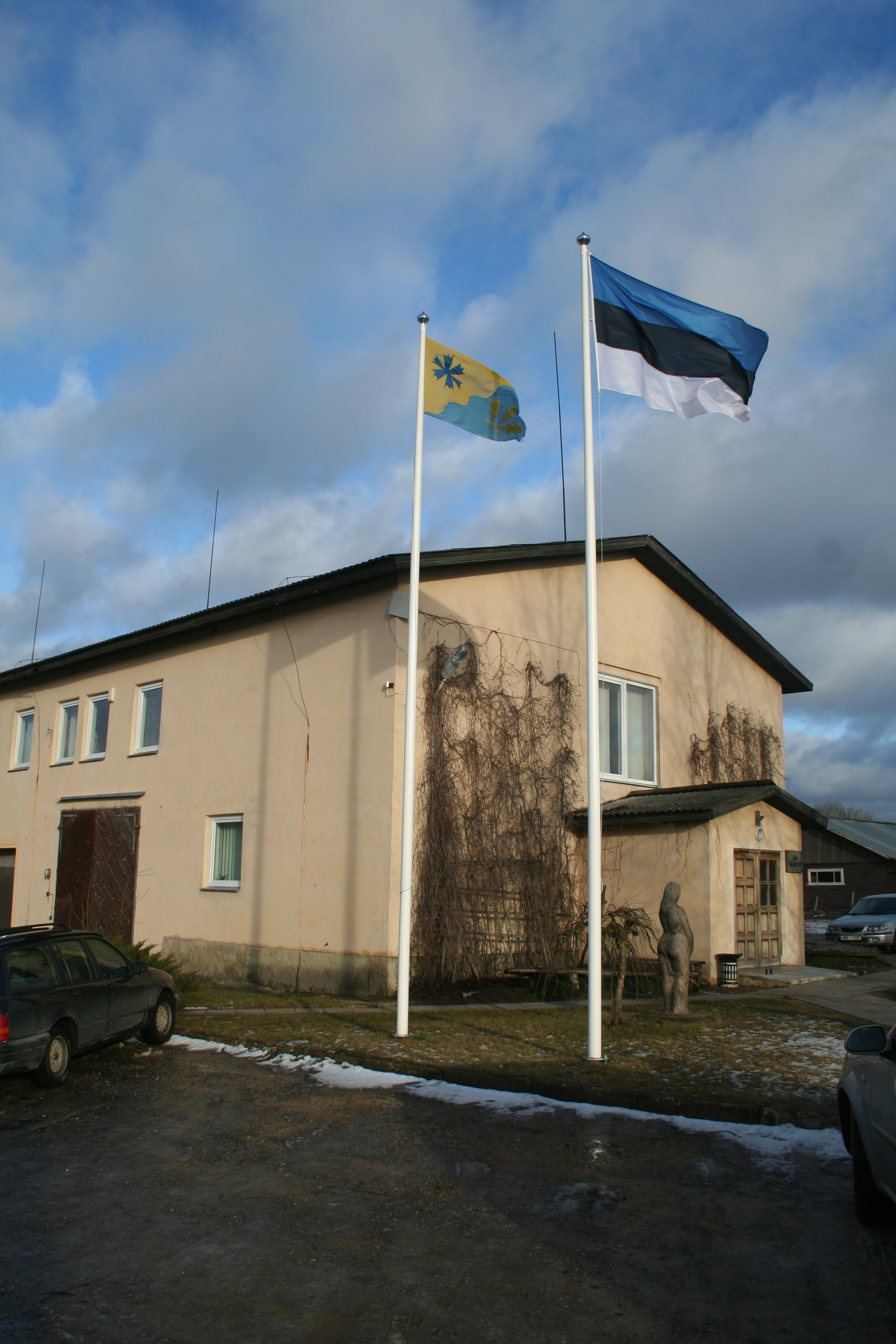 Lasva vallamaja